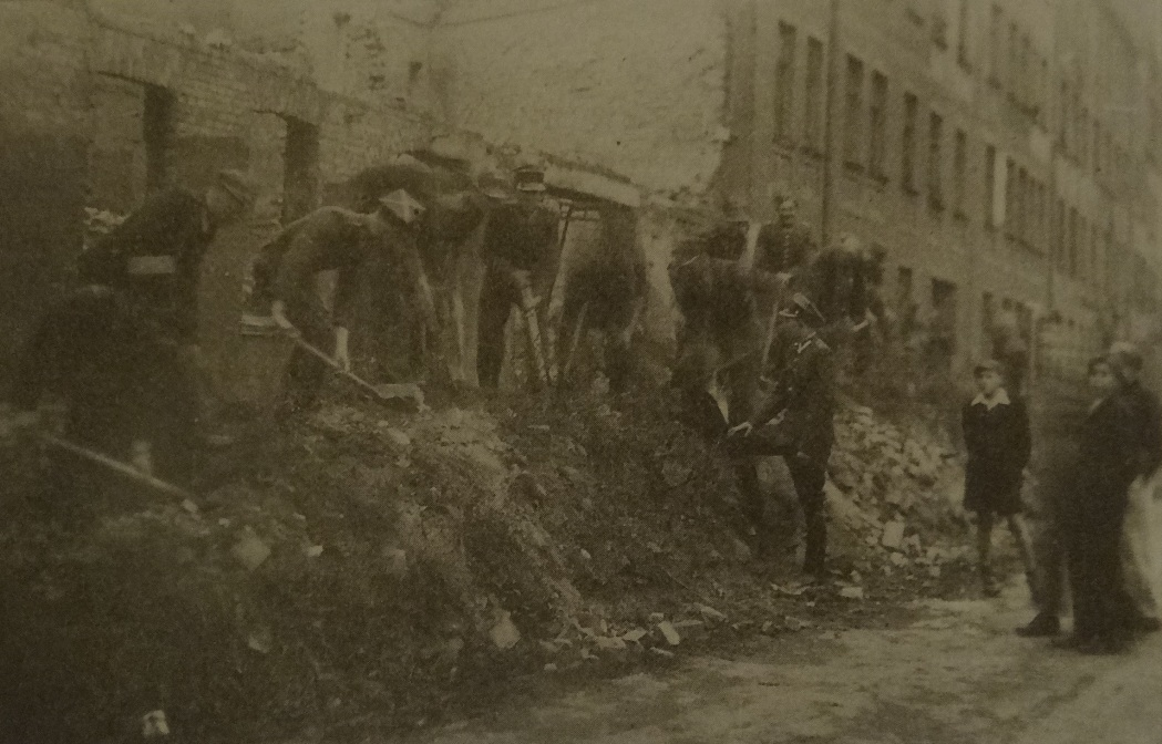 Stargard Szczeciński, 1947 r. Żołnierze 43 pp podczas odgruzowywania ul. Limanowskiego